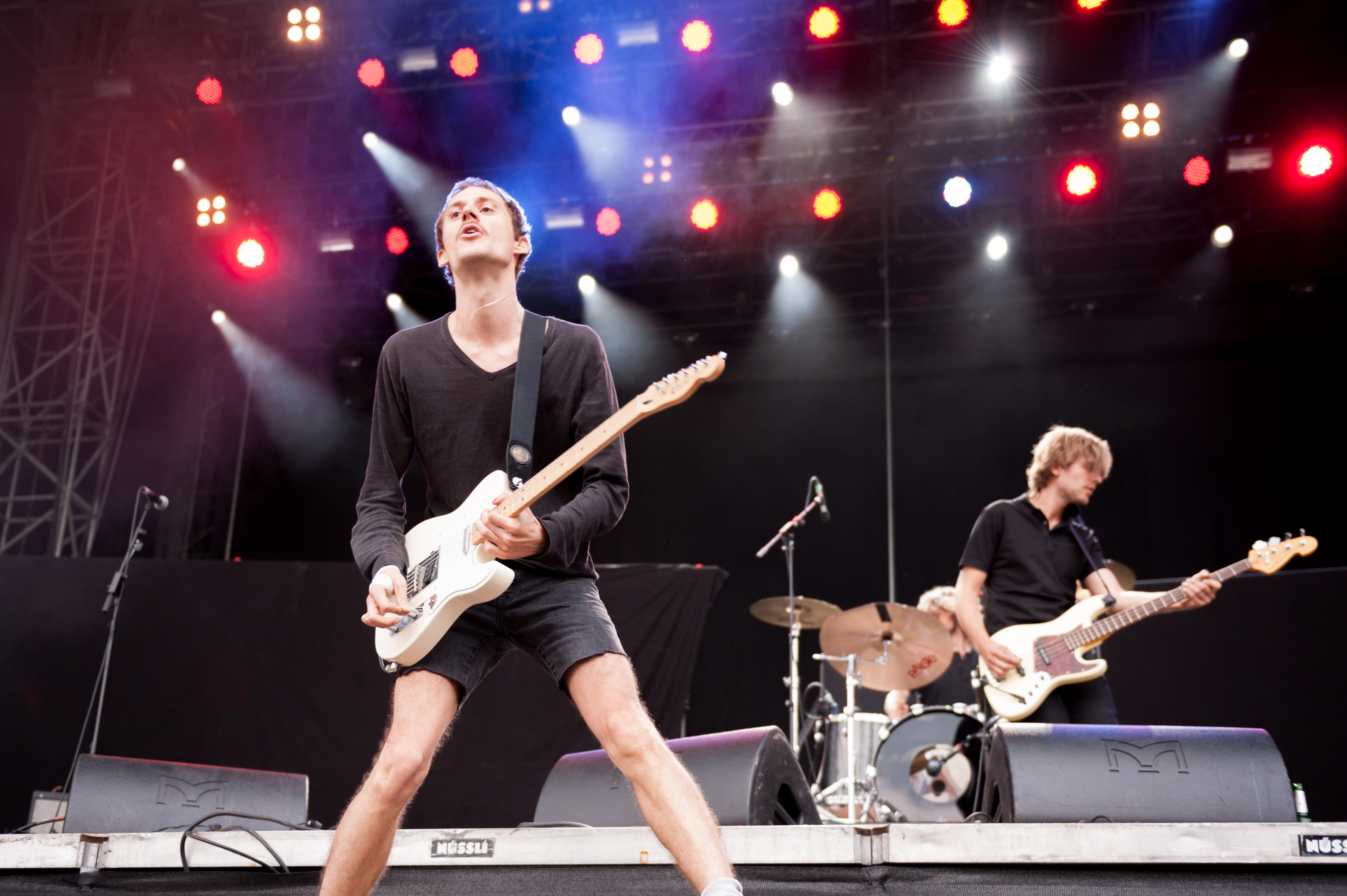 Die Band Milliarden auf dem Kosmonaut Festival 2015.